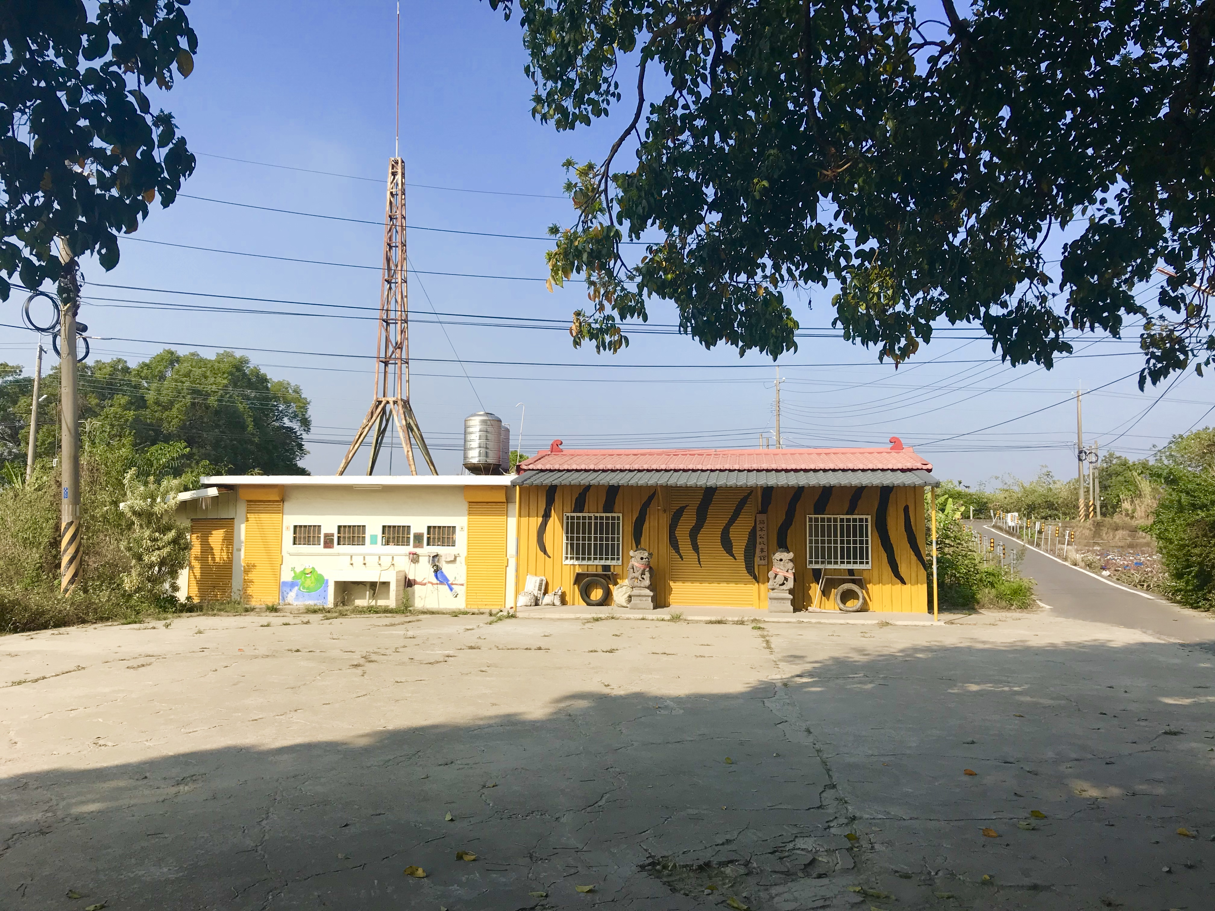 中文（台灣）: 新庄茄苳公故事館